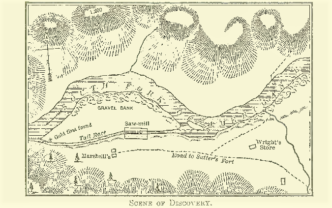 Kartenskizze der Lage von Sutters Sägewerk am Südarm des American River. Die Stelle des ersten Goldfundes ist am Ende des Auslaufkanals auf der Schotterinsel markiert. Etwas südwestlich der Sägemühle ist Marshalls Hütte eingezeichnet.